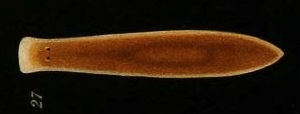 Uteriporus vulgaris (Lysekil, Schweden)